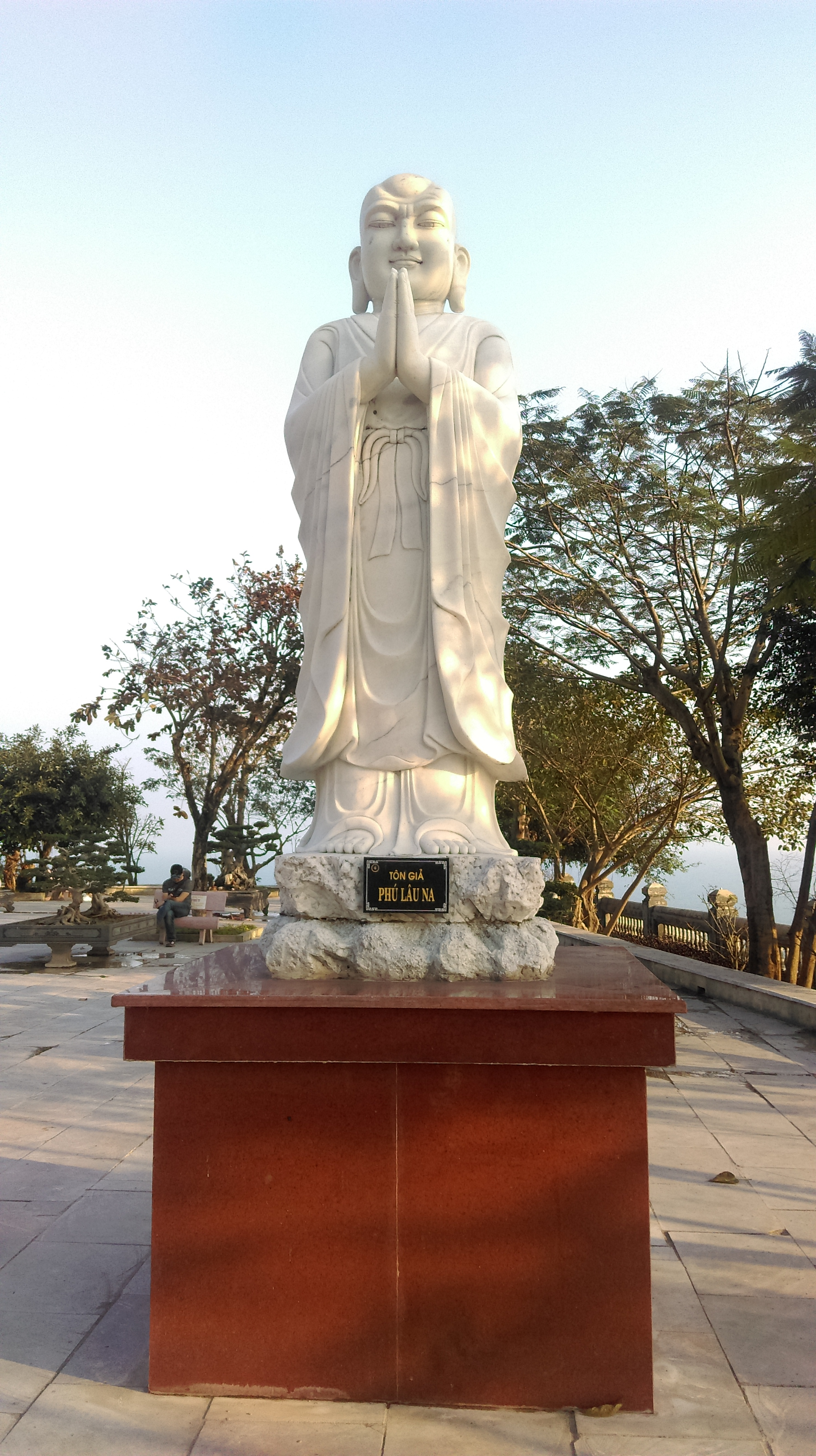 Phú Lâu Na, chùa Linh Ứng Sơn Trà, Đà Nẵng